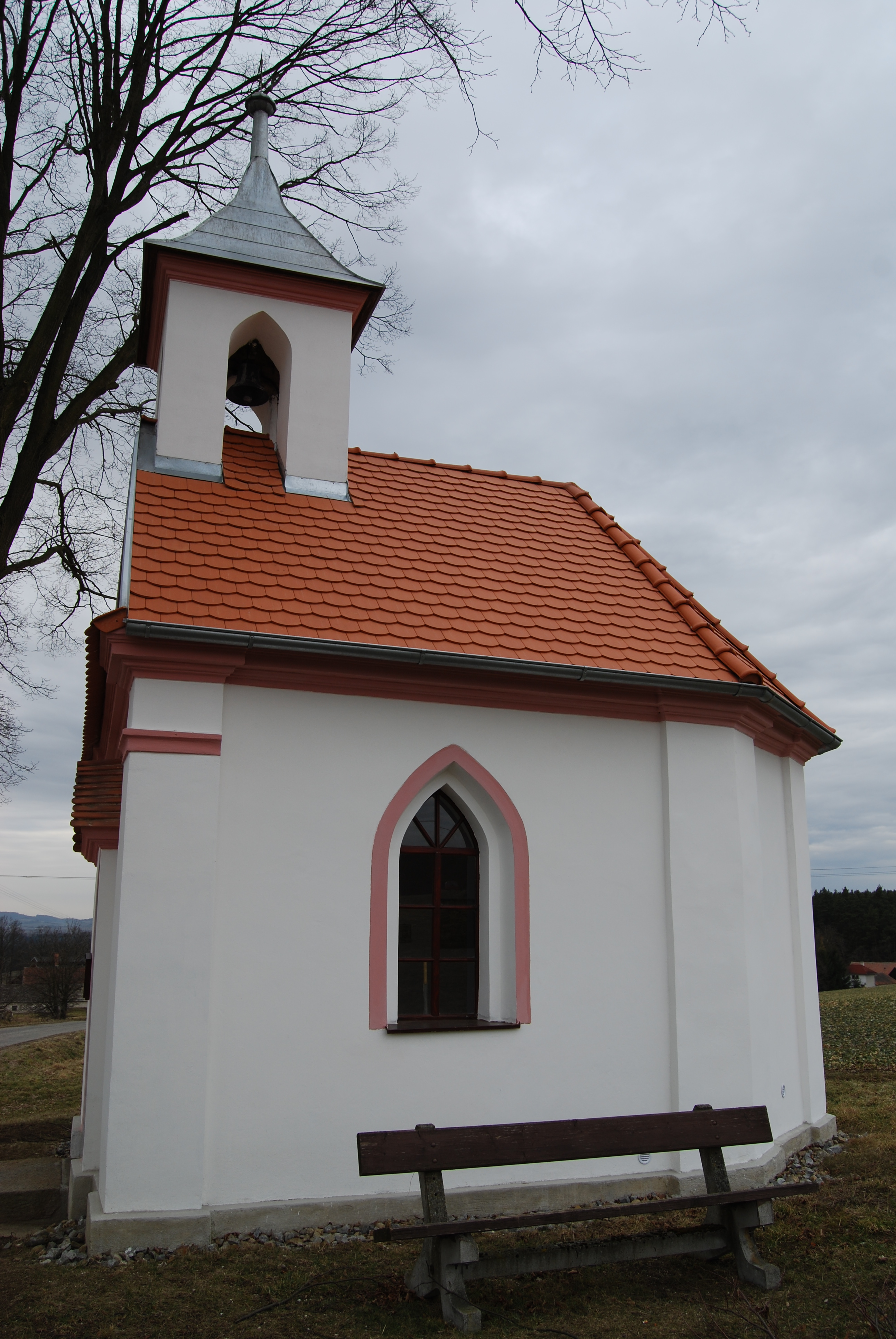 Návesní kaple. (Boční pohled). Smolečské Březí (Slabčice). Okres Písek. Česká republika.